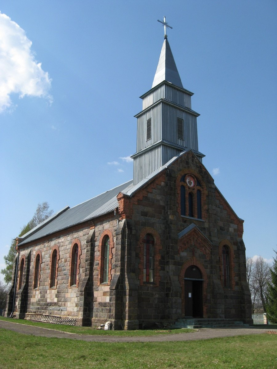 Ілья. Касцёл Найсвяцейшага Сэрца Ісуса